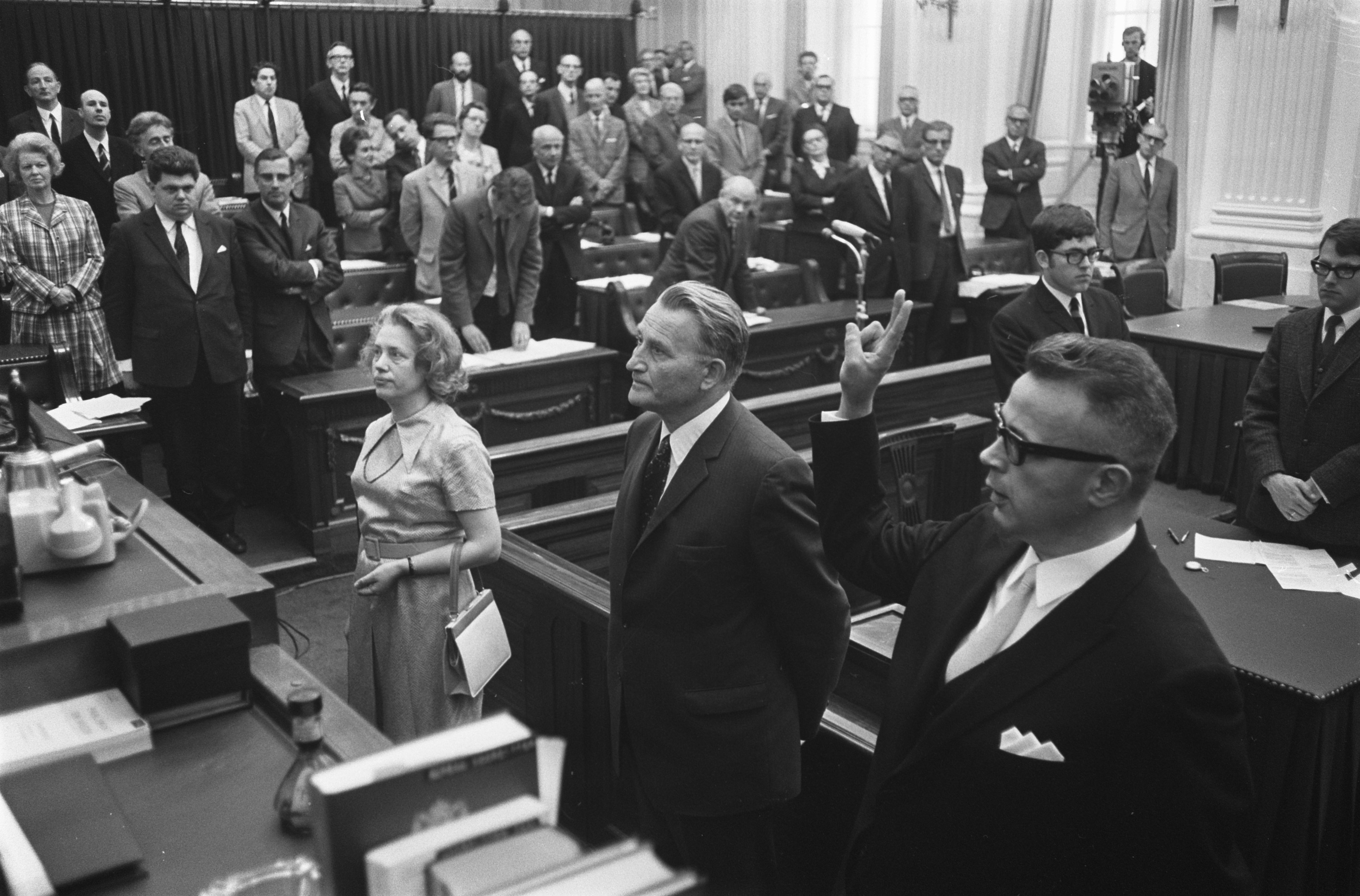 Collectie / Archief : Fotocollectie Anefo Reportage / Serie : [ onbekend ] Beschrijving : Installatie van nieuwe leden van de Tweede Kamer in Den Haag, waaronder PvdA-kamerlid A.M.C. Padt-Jansen (l) Datum : 3 juni 1969 Locatie : Den Haag, Zuid-Holland Trefwoorden : ambtsaanvaardingen, parlementariërs, politiek Persoonsnaam : Padt-Jansen, Annemiek Instellingsnaam : Tweede Kamer Fotograaf : Koch, Eric / Anefo Auteursrechthebbende : Nationaal Archief Materiaalsoort : Negatief (zwart/wit) Nummer archiefinventaris : bekijk toegang 2.24.01.05 Bestanddeelnummer : 922-4865